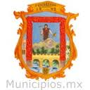 El escudo oficial del municipio de Santa María del Río